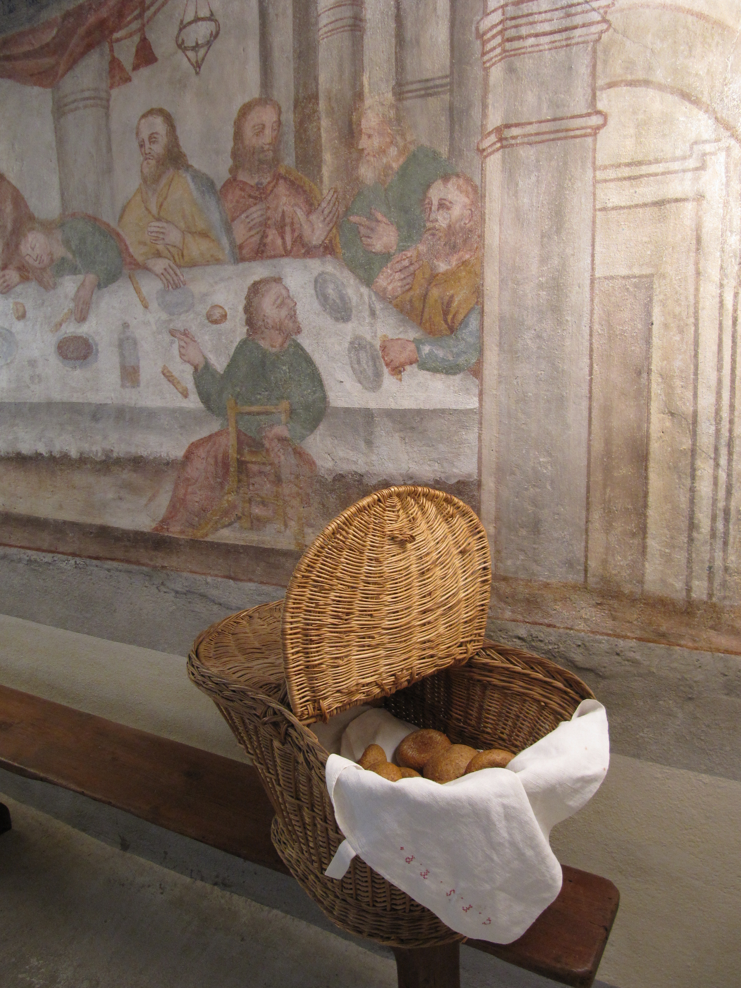 Cesto di "micooule" (piccoli pani) davanti all'affresco con l'Ultima cena al Museo della Confrérie di Donnas